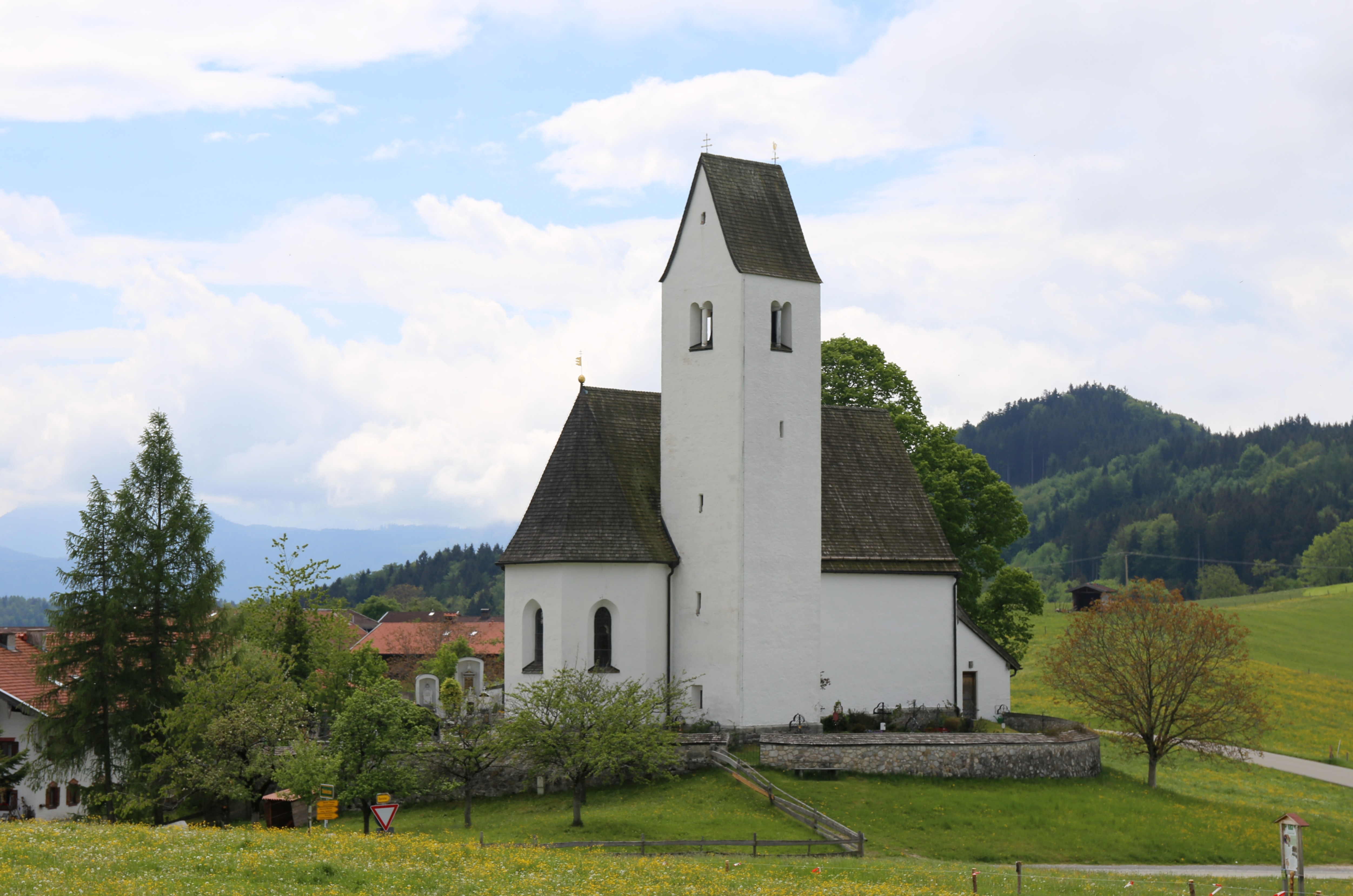 Steinkirchen 1, Samerberg; Katholische Kirche St. Peter und Friedhof, spätgotische Anlage, Ende 15. Jahrhundert, im Inneren barockisiert; mit Ausstattung; Friedhof mit Ummauerung und schmiedeeisernen Grabkreuzen, 18.–20. Jahrhundert